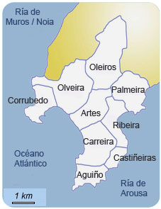 Division parroquial do Concello de Ribeira